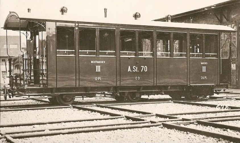 Drittklasswagen C3 70 der Appenzeller-Strassenbahn (ASt)